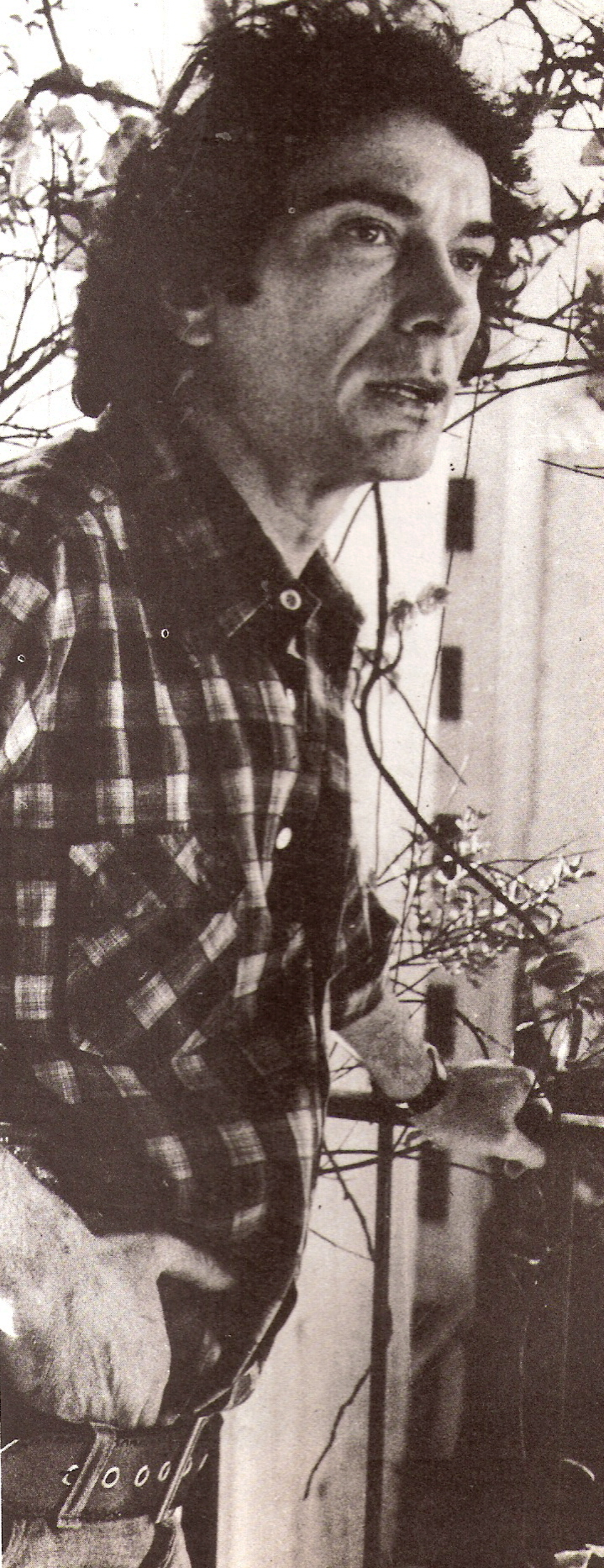 Alfredo Alcón, actor argentino